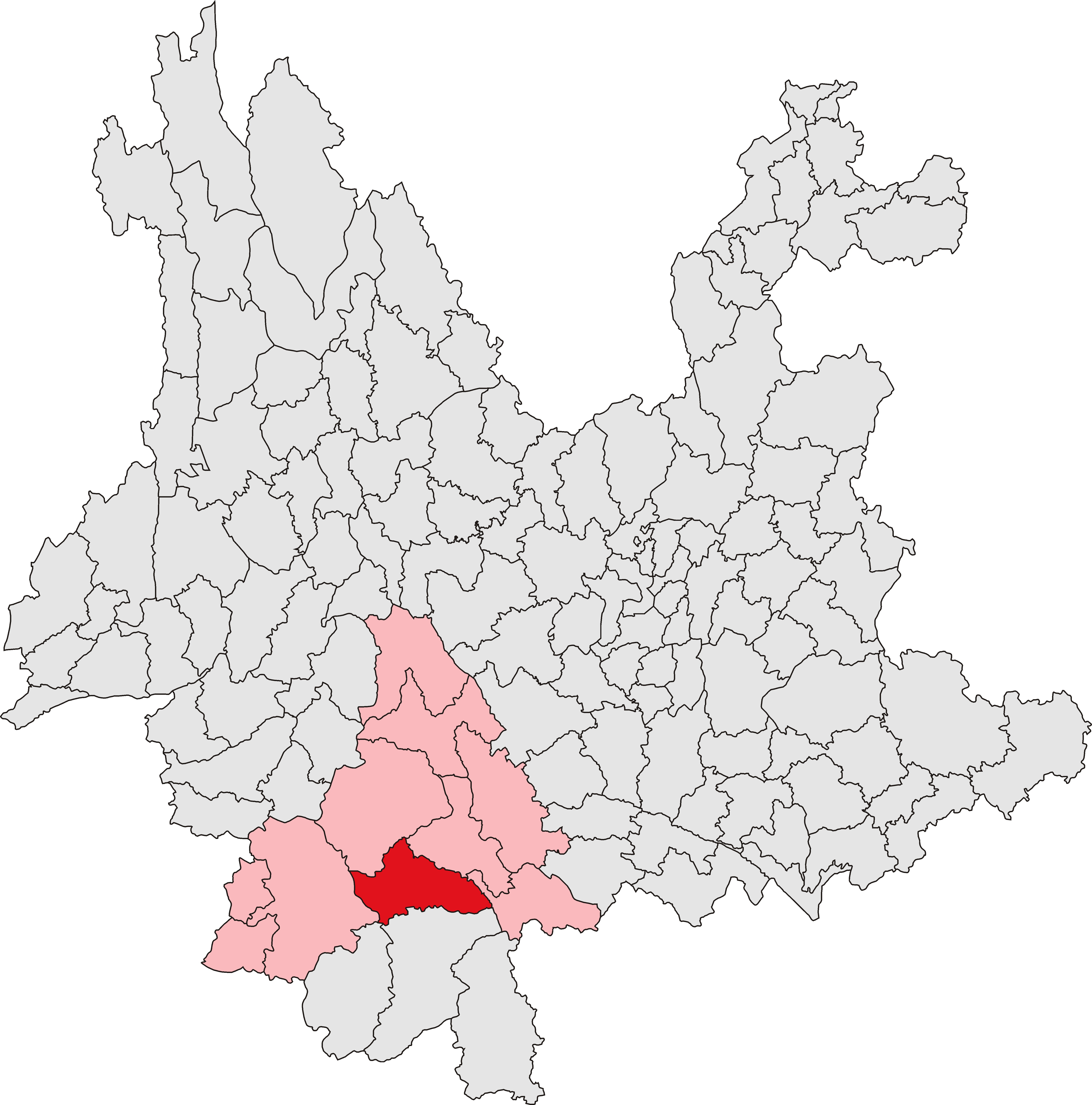 中文（中国大陆）: 思茅区位置图